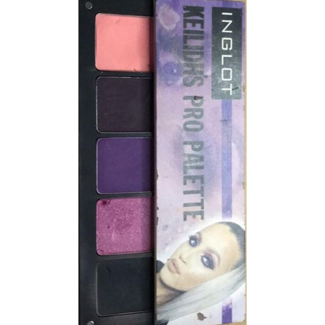 It is an image of Keilidh Cashell's eyeshadow palette with Inglot